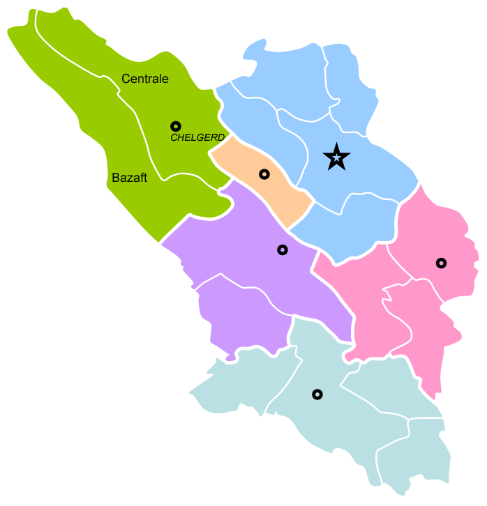 Map of Kuhrang sharestan in Chahar Mahal and Bakhtiari province, Iran